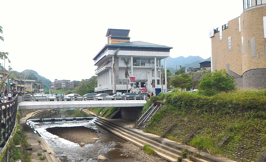 Bân-lâm-gú: 新北市平溪區汐平橋。白色彼間大樓是新北市平溪市民活動中心，1樓是新北市平溪區衛生所，2樓是平溪市民活動中心，3樓是新北市立圖書館平溪分館，以前的臺北縣平溪鄉民代表會就佇3樓。(原圖切)